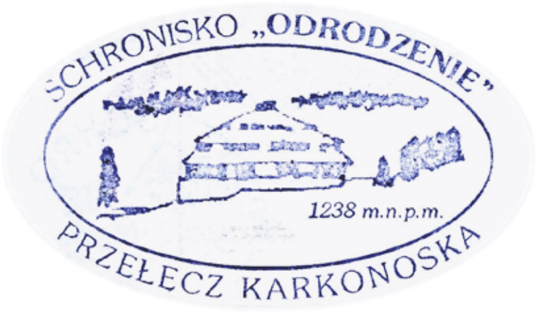 Stempel des Berghotels Schronisko Odrodzenie